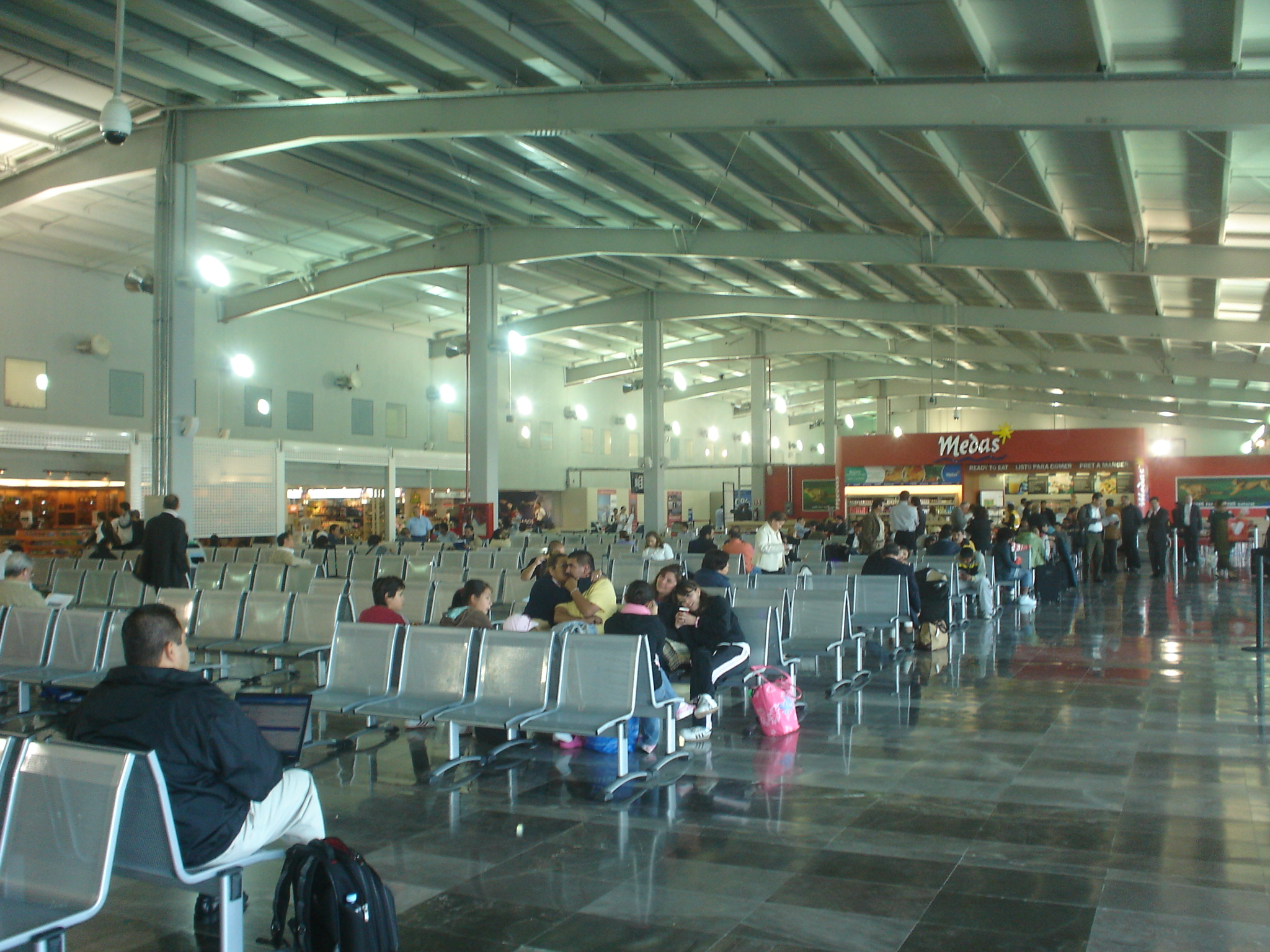 Salas de Ultima Espera del Aeropuerto de Toluca